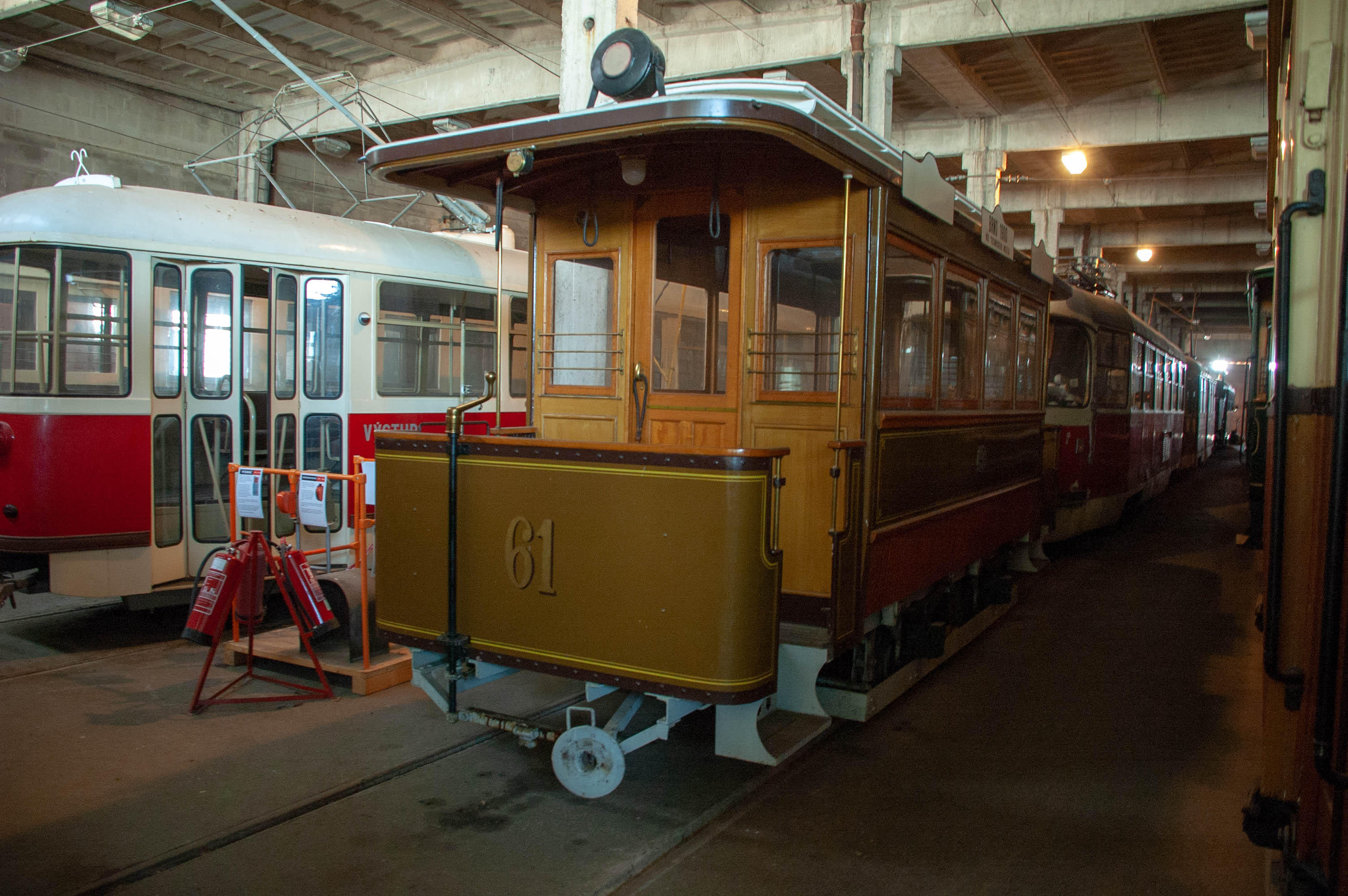 Vozidla v depozitáři TMB v Líšni – vlečný vůz č. 61